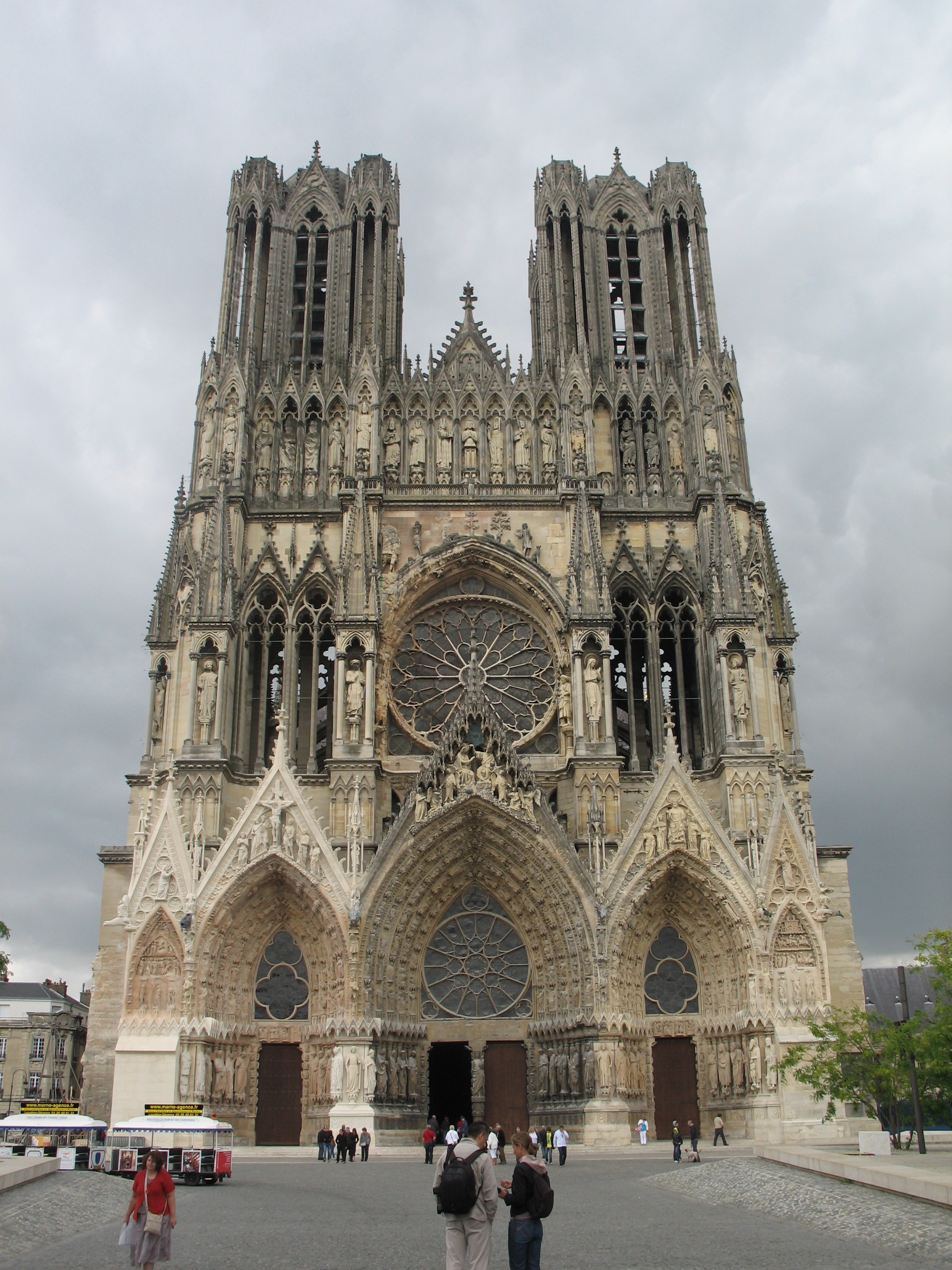 Cathédrale Notre-Dame, ancienne abbaye Saint-Rémi et palais de Tau, Reims